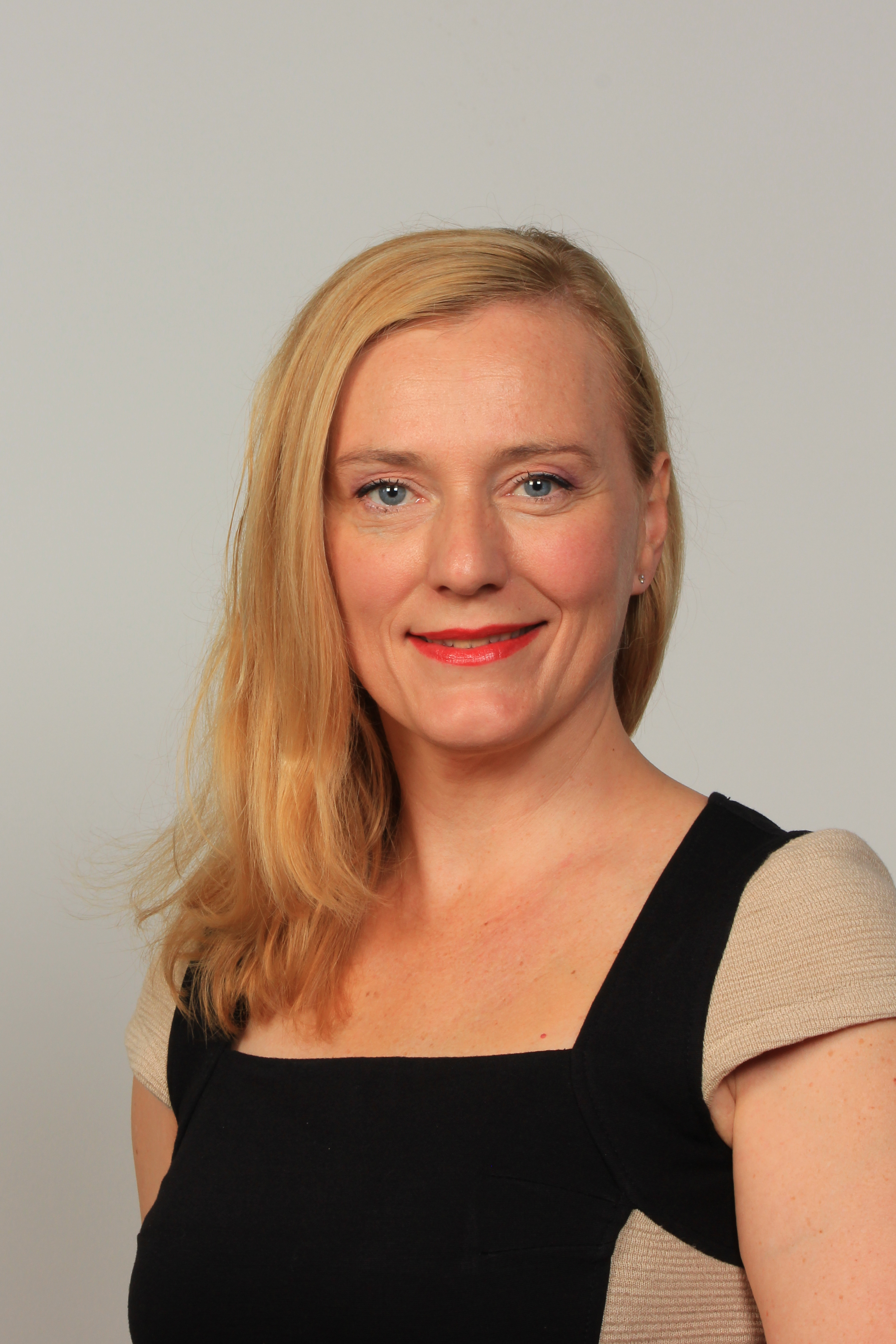 Fotoprojekt Österreichischer Film 2016: Schauspielerin Lena Reichmuth